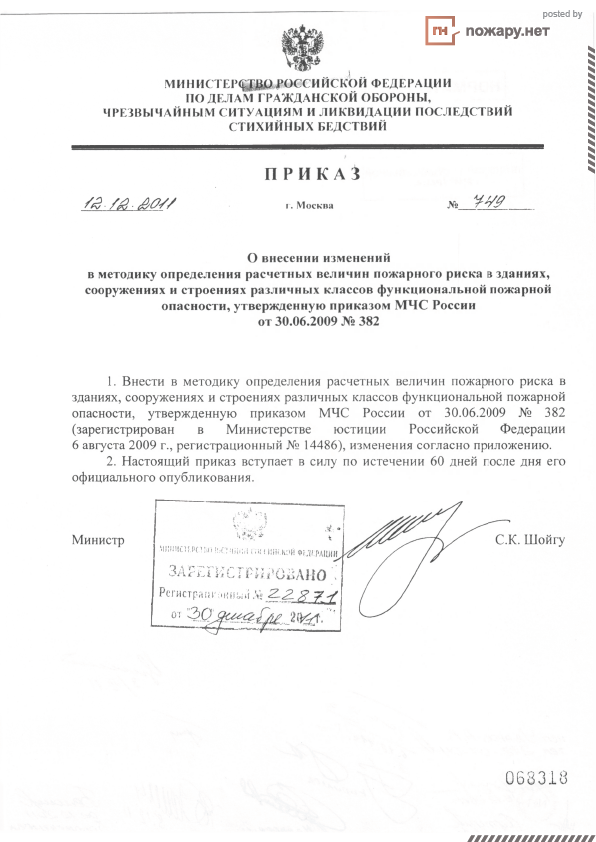 Приказ МЧС России от 12.12.2011 №749